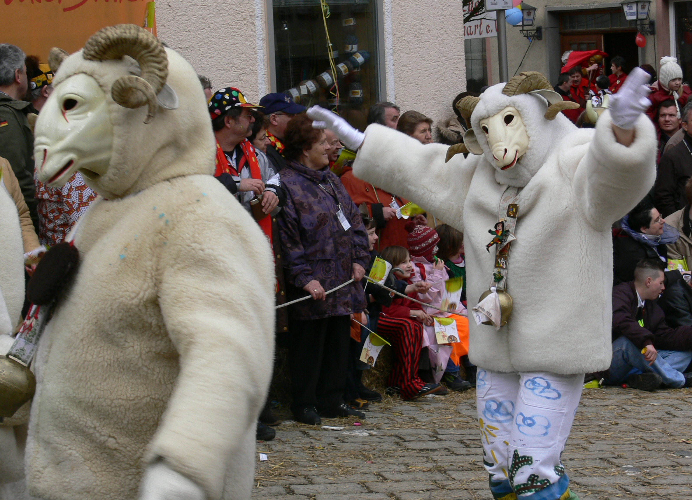 Bockzunft Stetten am kalten Markt, Figur: Bock; beim Narrensprung beim Narrentreffen Meßkirch 2006